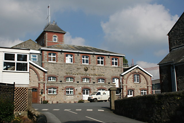 St Austell Brewery